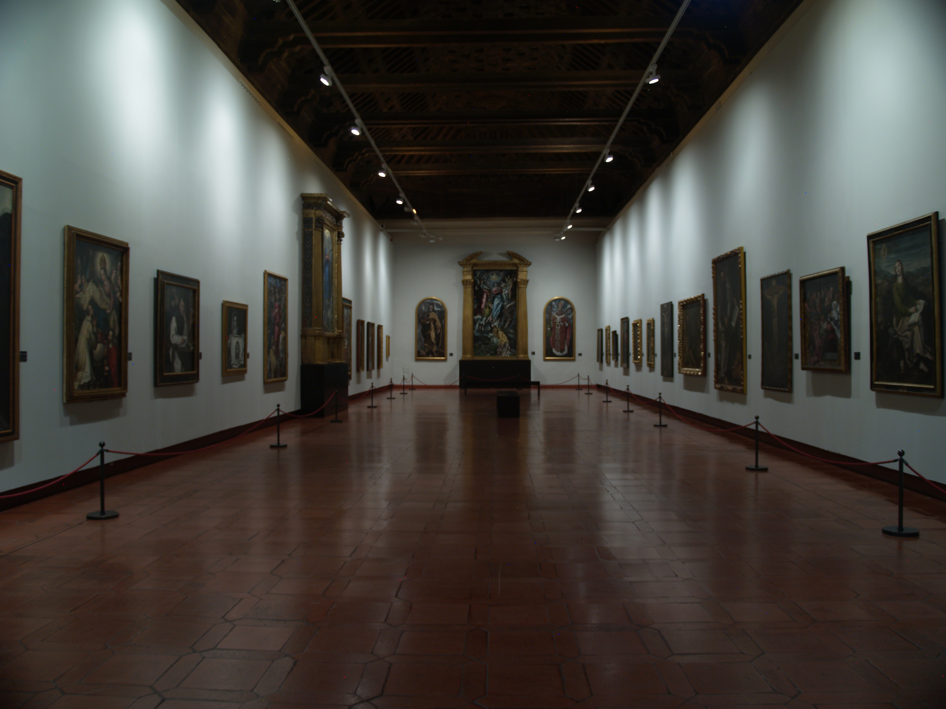 Toledo. Museo de Santa Cruz. Nave del antiguo hospital.